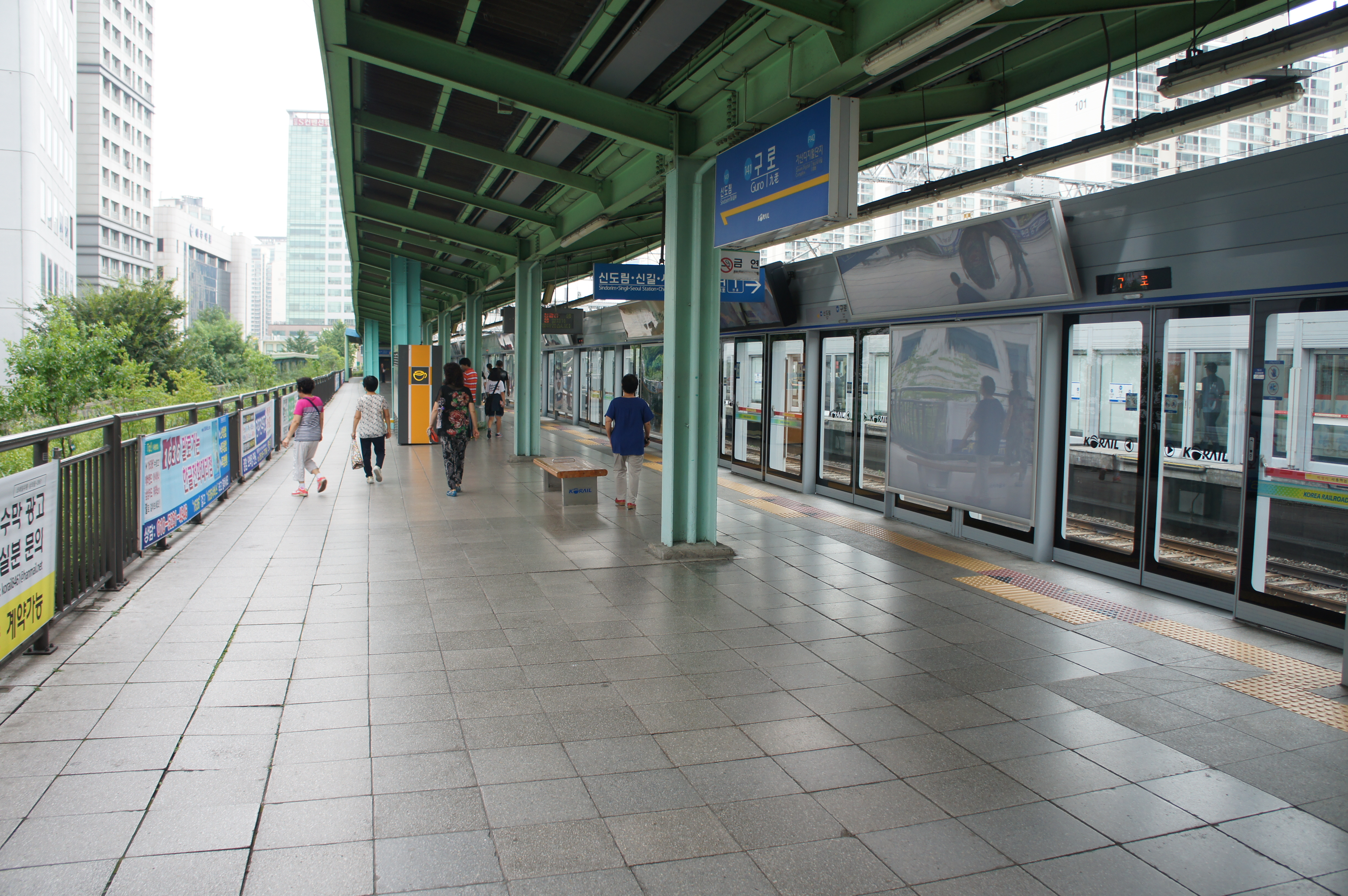 구로역 1번 승강장